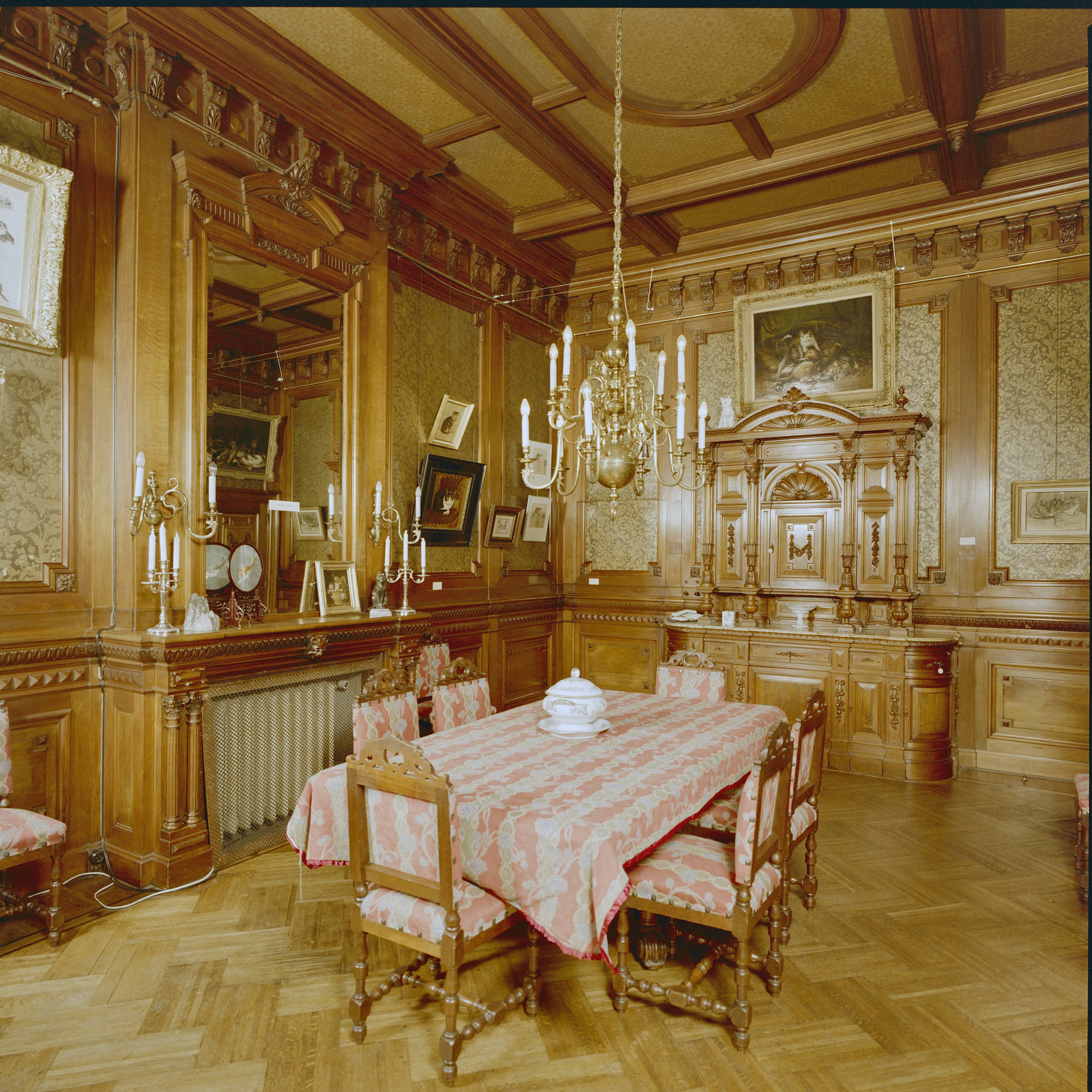 KATTENKABINET: INTERIEUR, OVERZICHT ACHTERKAMER